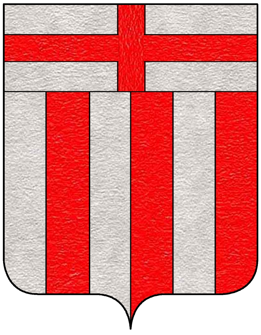 Stemma della famiglia Giorgi